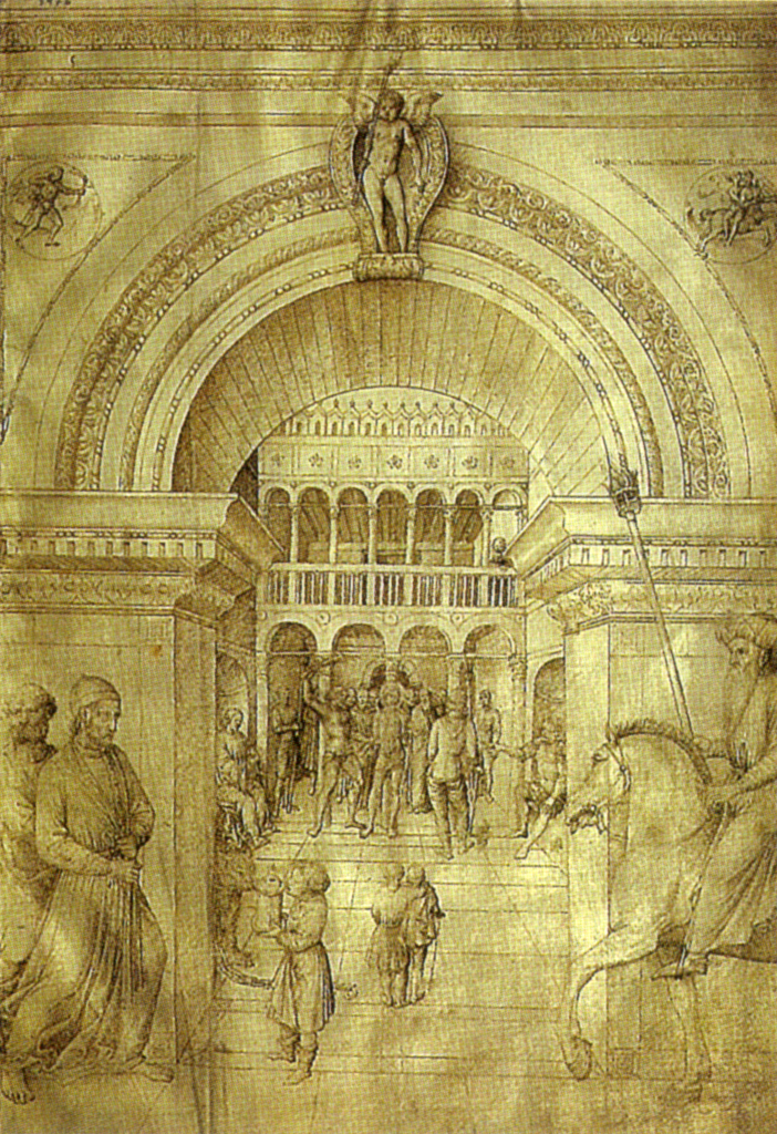 Jacopo bellini, flagellazione, louvre.jpg Musée du Louvre, Paris